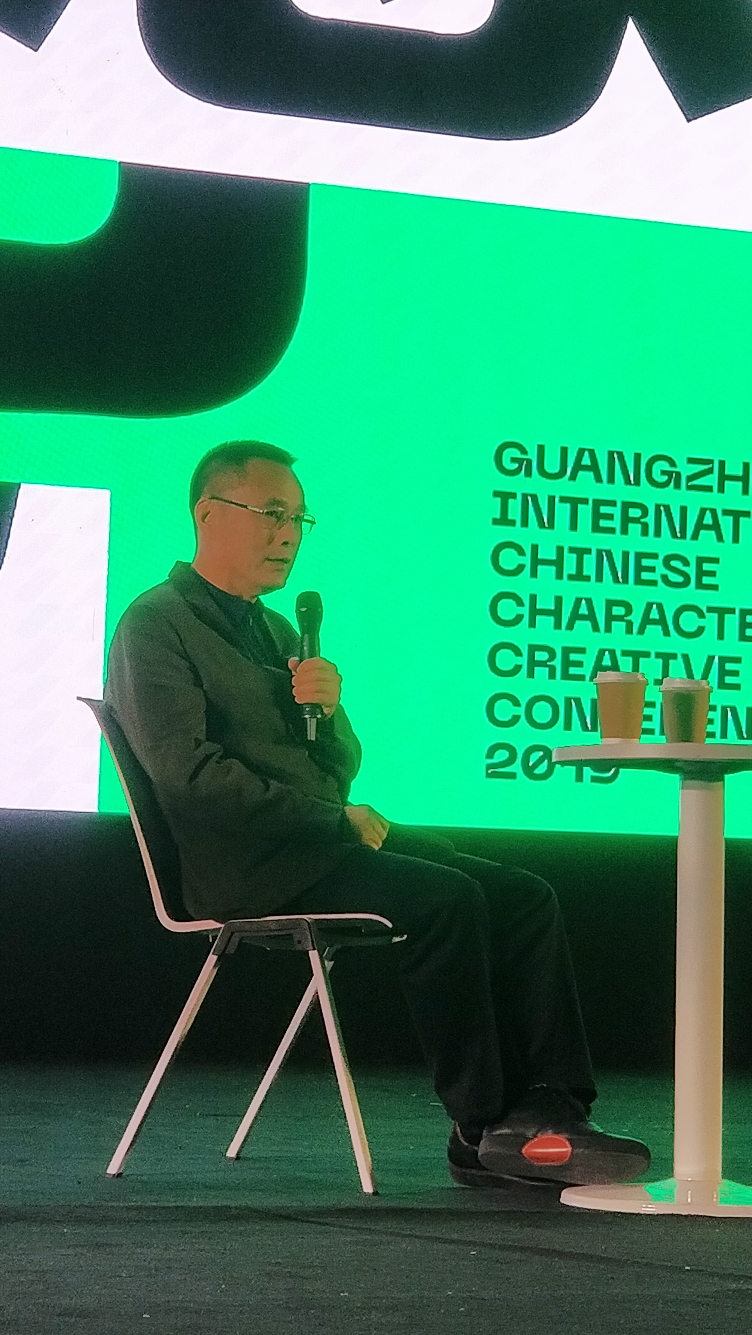 中文（中国大陆）: 2019年12月28日，朱志伟在 “后信息时代——2019广州国际汉字创意大会” 现场。